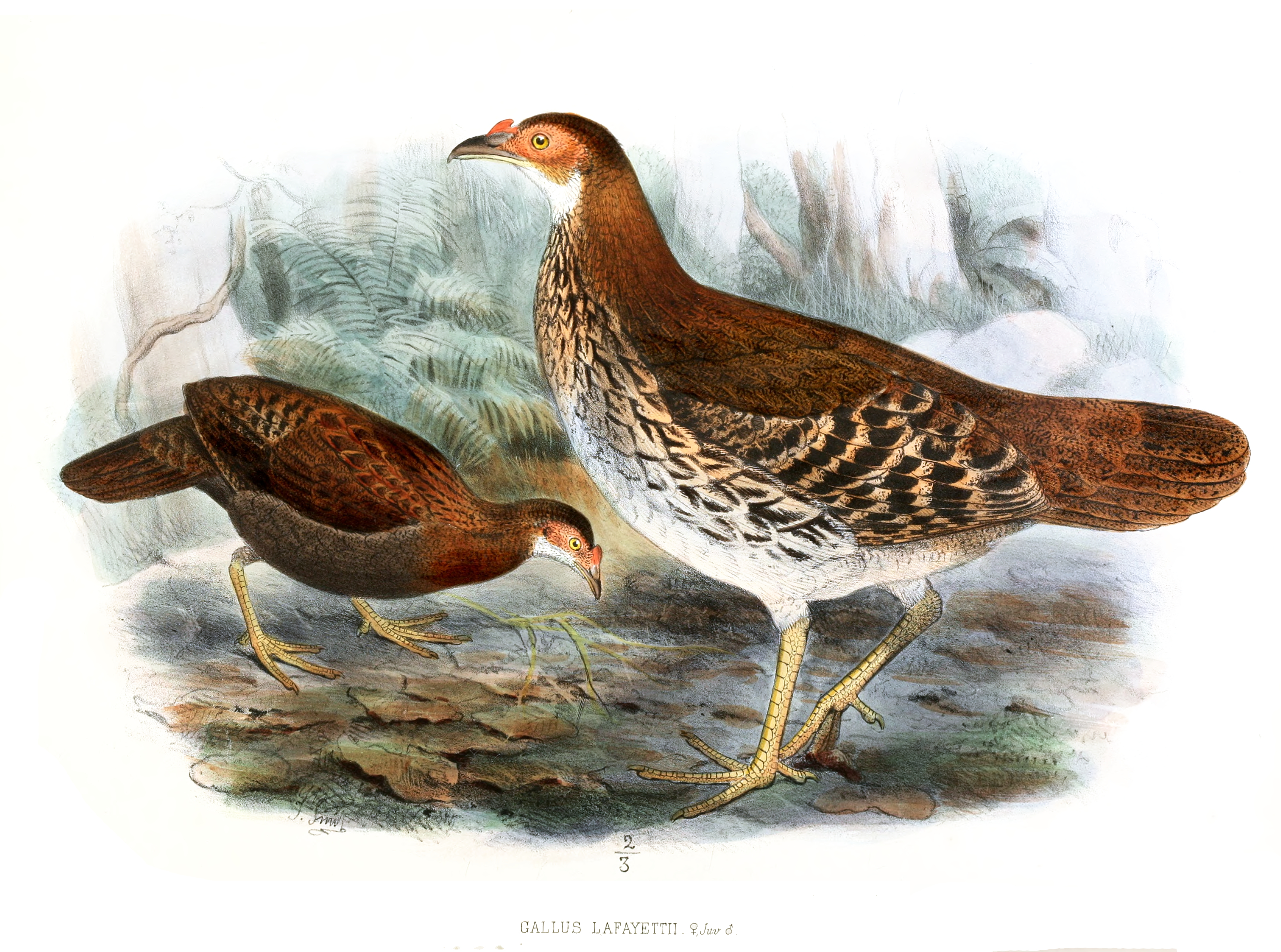 Gallus lafayetii hens.